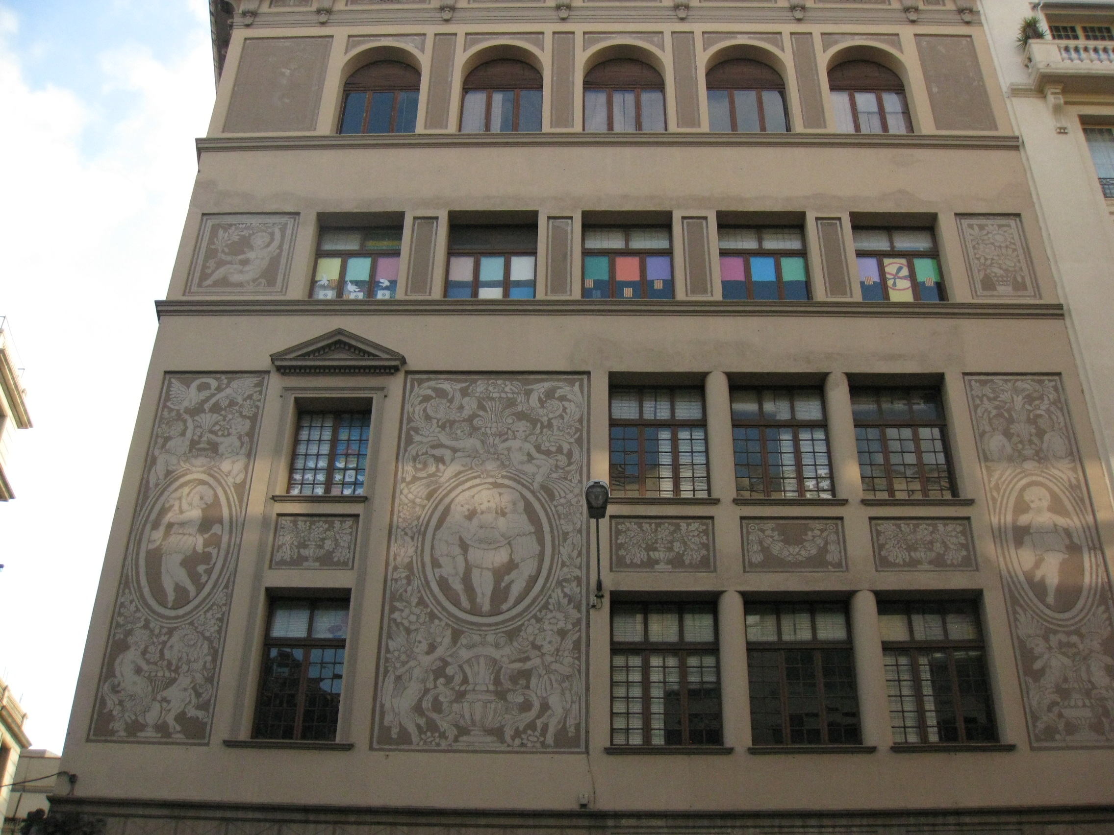 Edifici escolar de 1918-22, amb façanes a la Via Laietana i als carrers Salvador Aulet i Sotstinent Navarro, al barri Gòtic de Barcelona. Està adornat amb terracotes i esgrafiats de tema infantil, de Francesc Canyelles. Aquí es veu la façana de la Via Laietana.